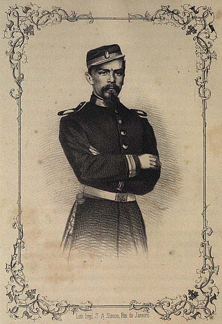 Antonio Tiburcio Ferreira de Souza